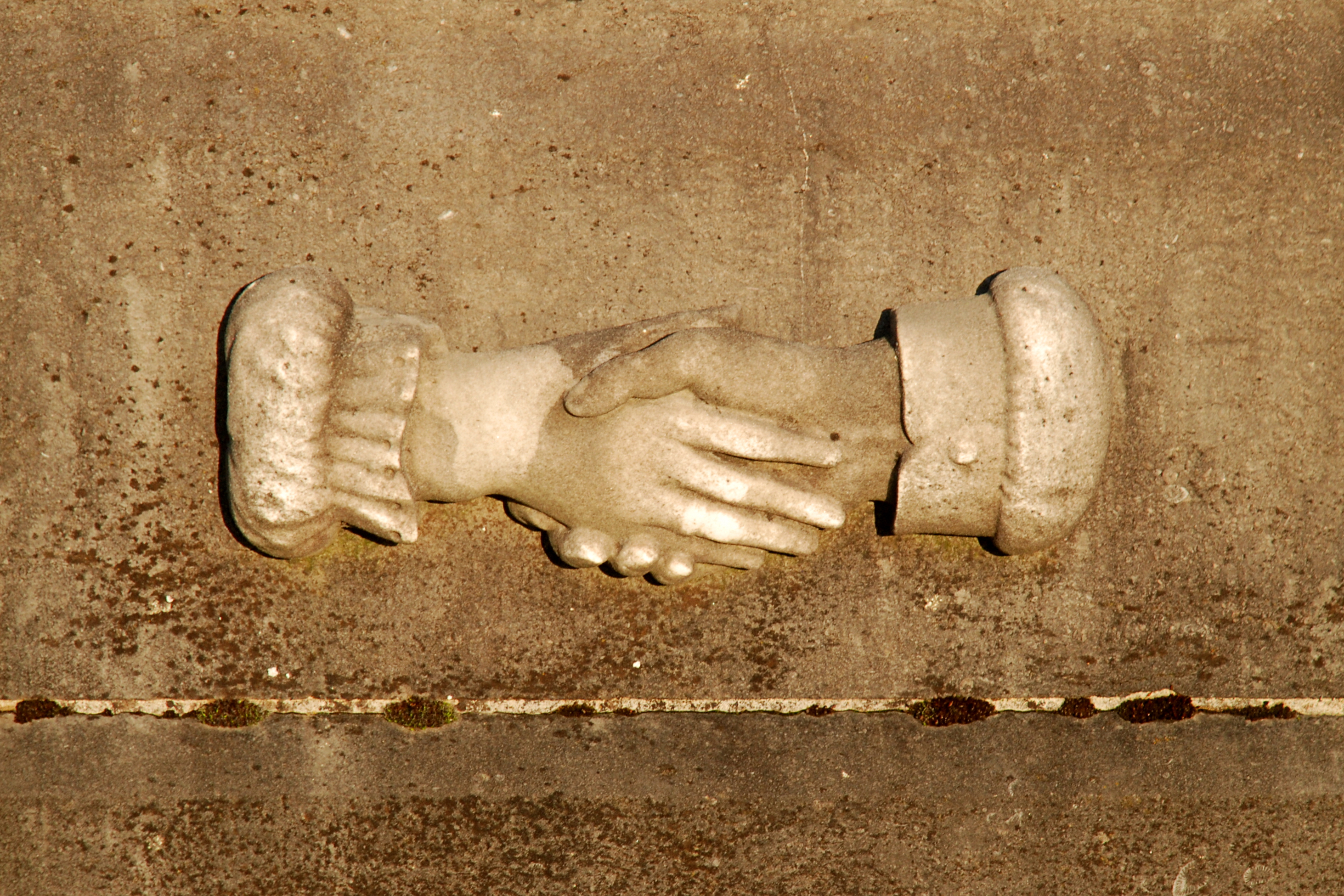 Belgique - Brabant wallon - Cimetière de Court-Saint-Étienne